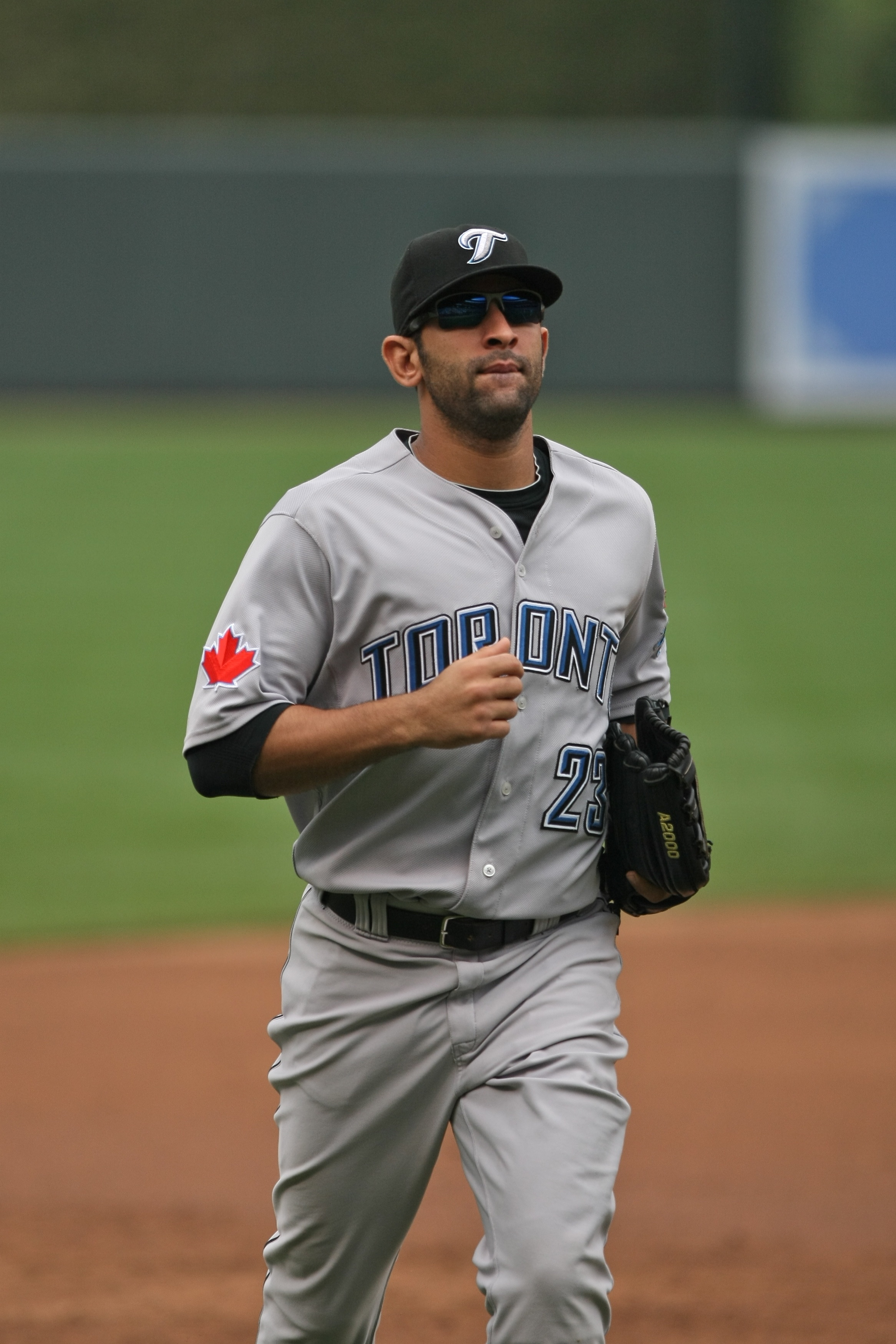 José Bautista in 2009